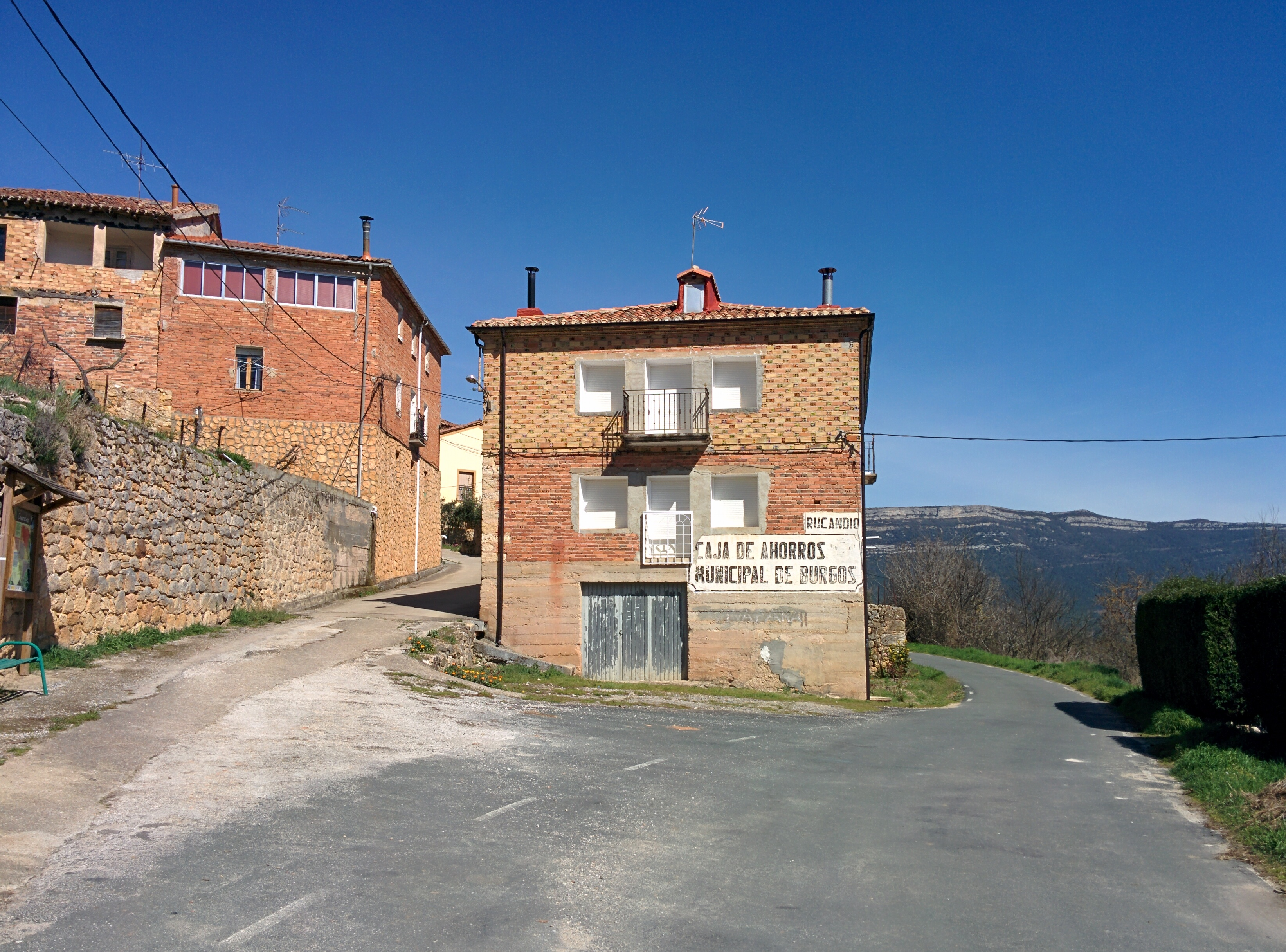 Entrada a Rucandio (Burgos, España).